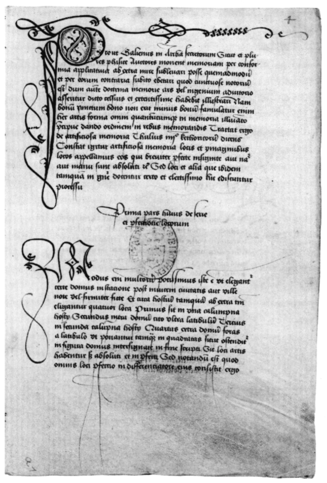 Mittelalterliches Hausbuch von Schloss Wolfegg Fol. 4r: Beginn der „Gedächtniskunst“